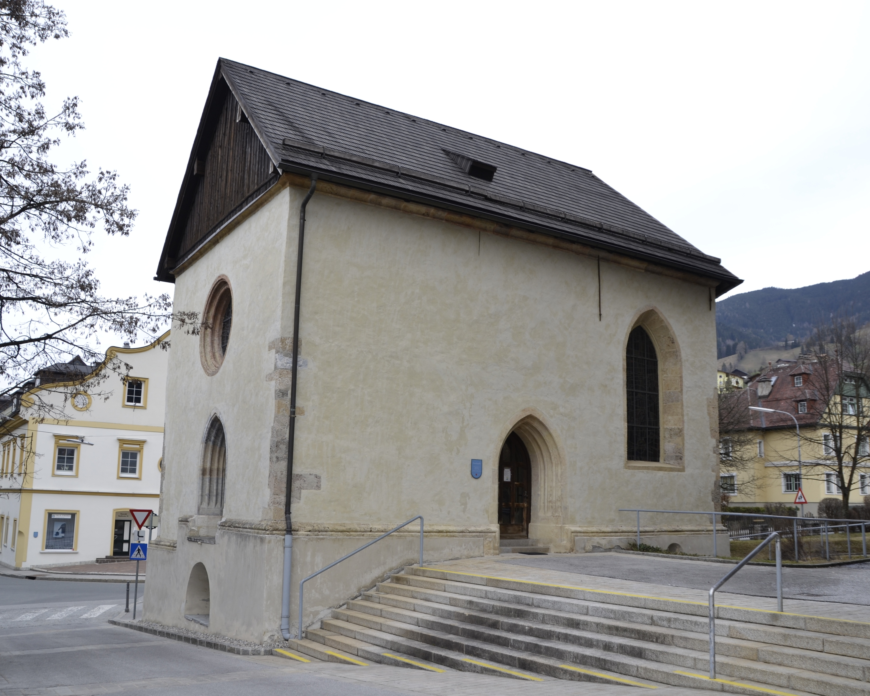 Die Annakapelle in Sankt Johann im Pongau wurde im Jahr 1301 erbaut und befindet sich neben der Pfarrkirche St. Johannes.